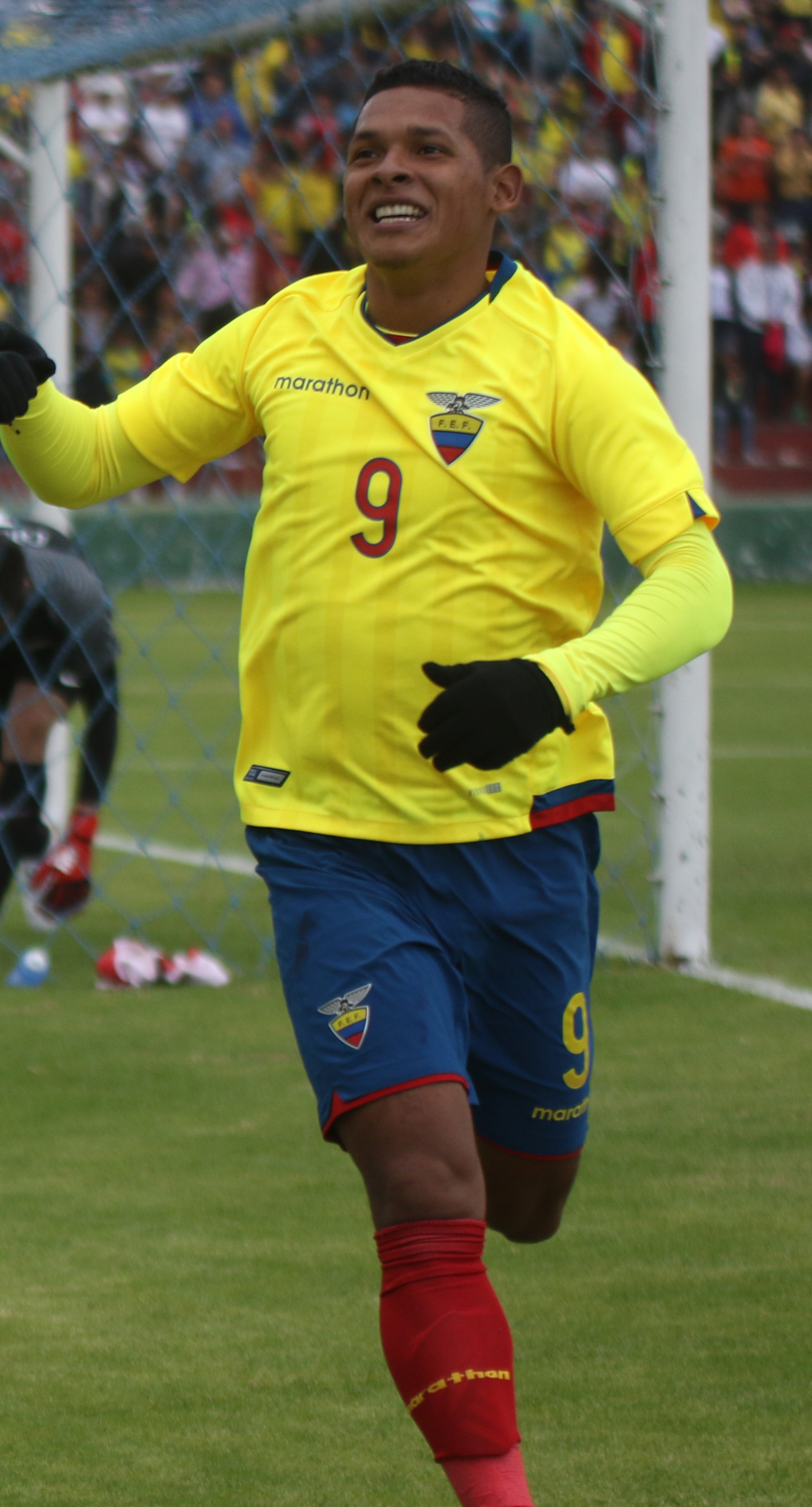 Ambato, Ecuador, 22 enero 2017 (Andes).- Ecuador igualó 1-1 este domingo con Chile en la ciudad de Ambato y dejó vivas las posibilidades de clasificar a la fase final del Campeonato Sudamericano Sub 20 del que es anfitrión, y se alista desde ya para jugar con Paraguay en la última jornada, el jueves próximo, en la ciudad ecuatoriana de Ríobamba. ANDES/Micaela Ayala V.